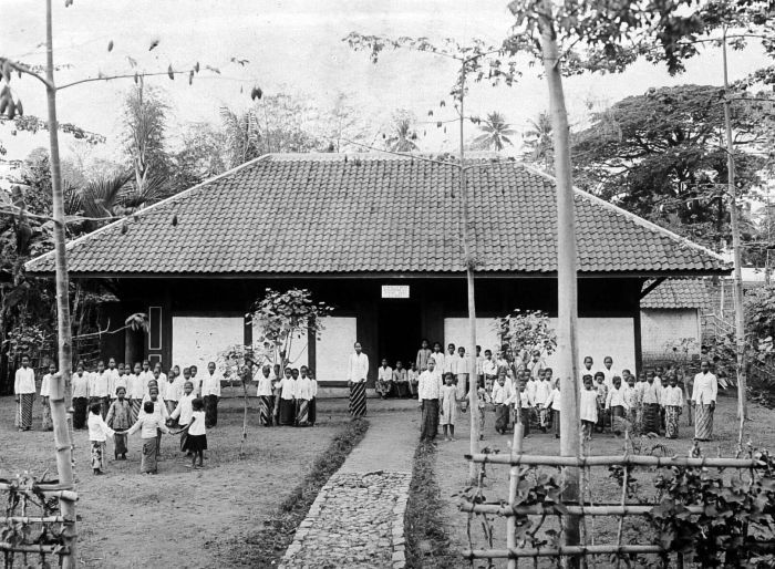 Repronegatief. Meisjes Volksschool te Pati, Midden-Java